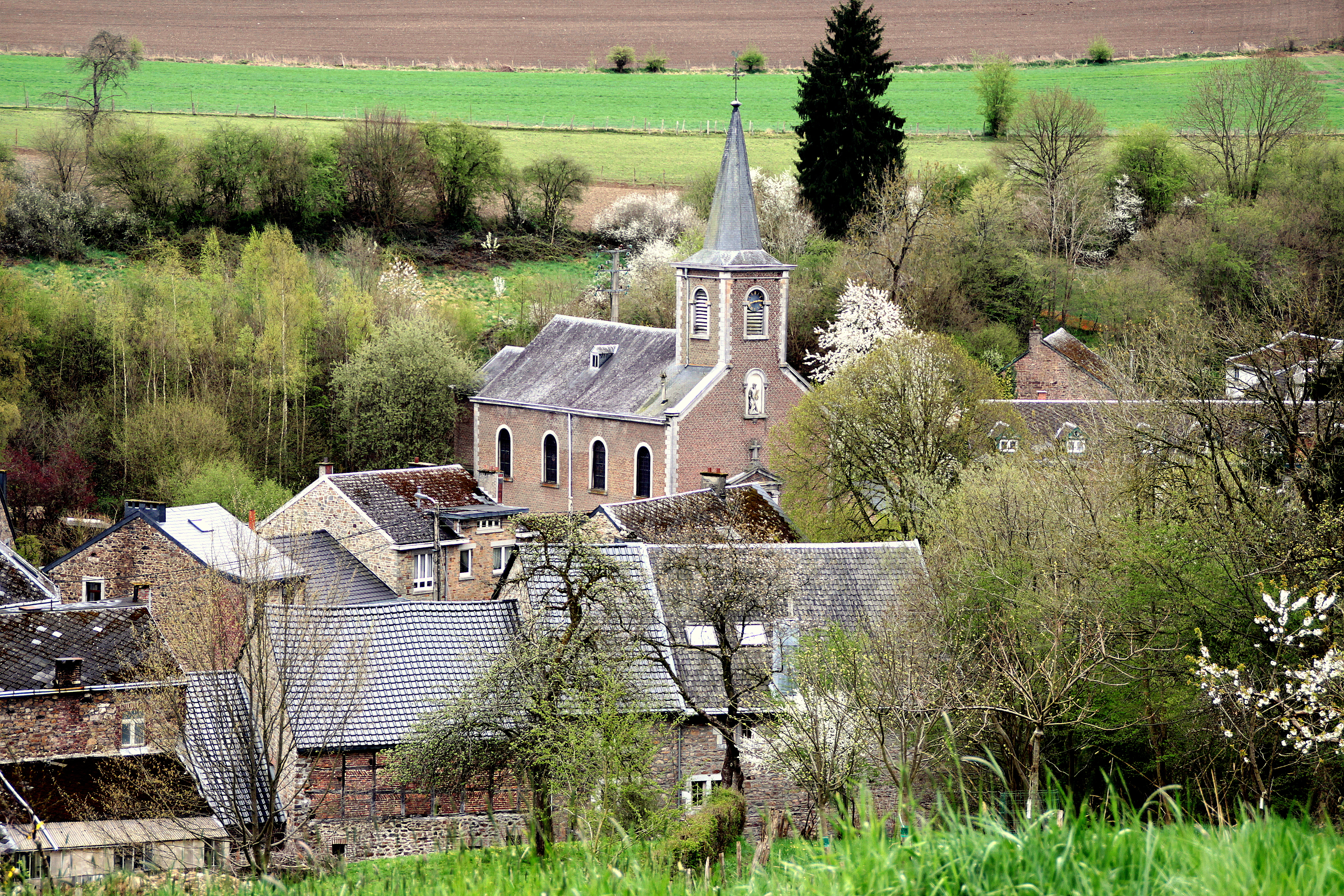 Winamplanche vun uewe gesinn